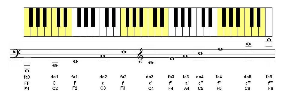 clavier de clavecin sur 5 octaves : correspondance des touches, notes et noms des notes